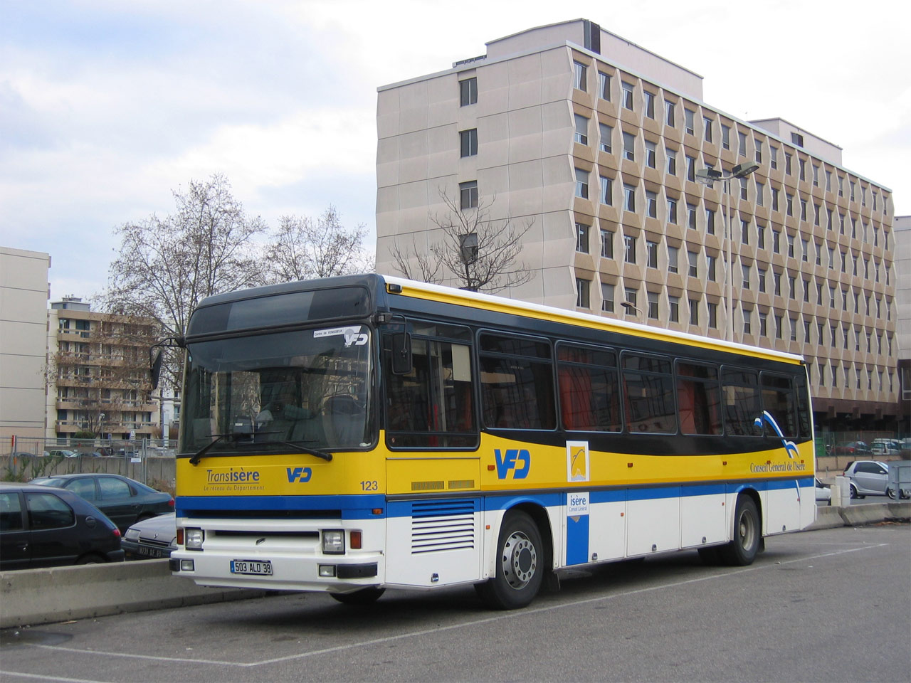 autocar Renault Tracer